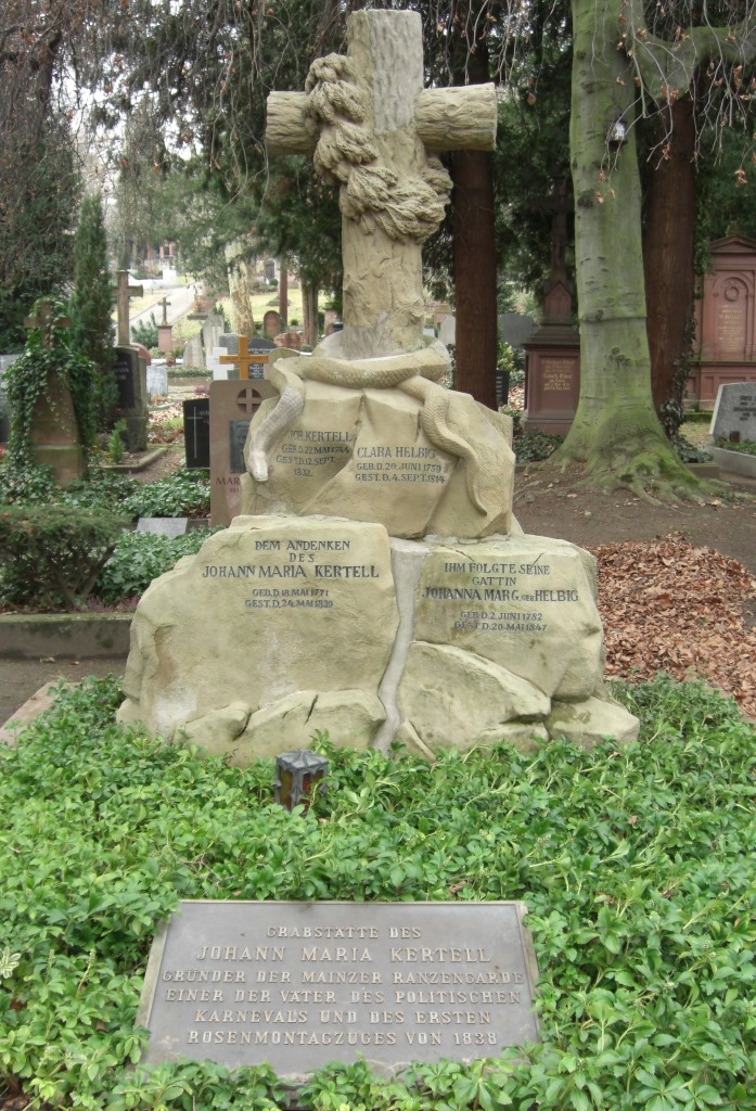 Grab des Unternehmers, Politikers und Karnevalisten Johann Maria Kertell, 1771-1839, auf dem Hauptfriedhof in Mainz